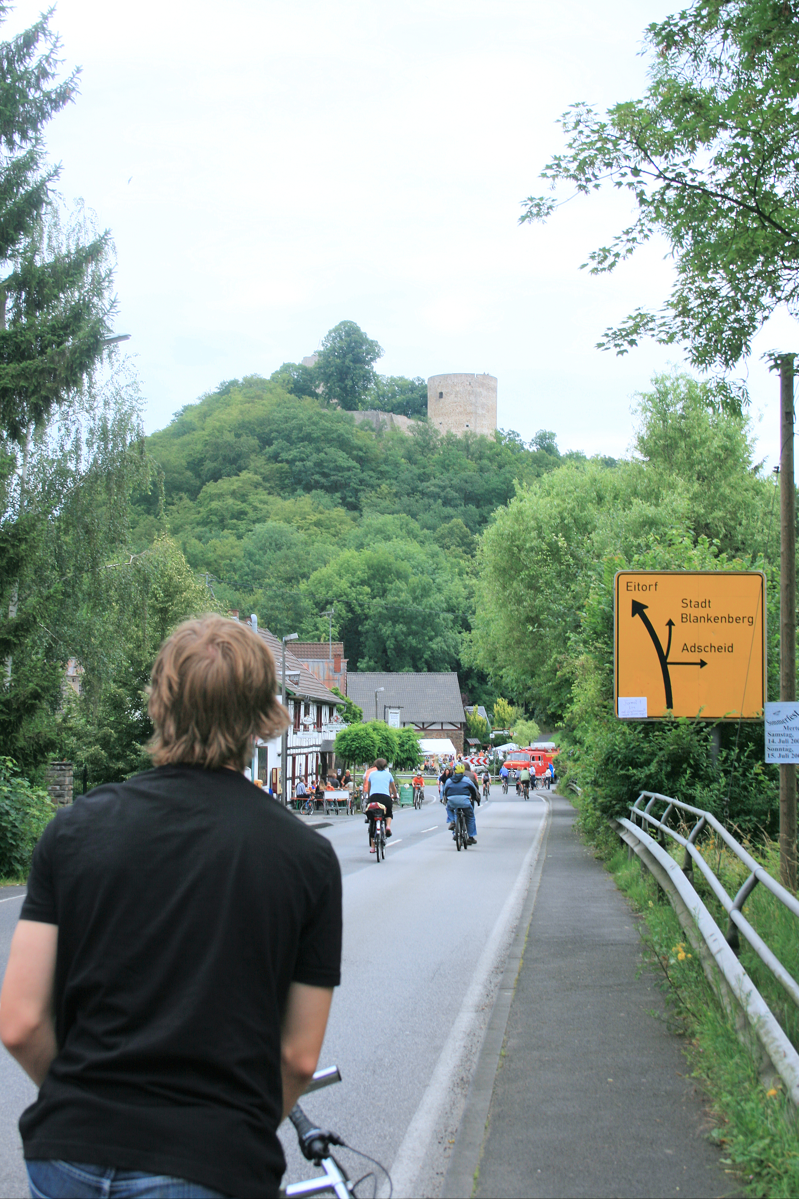 Siegtal pur